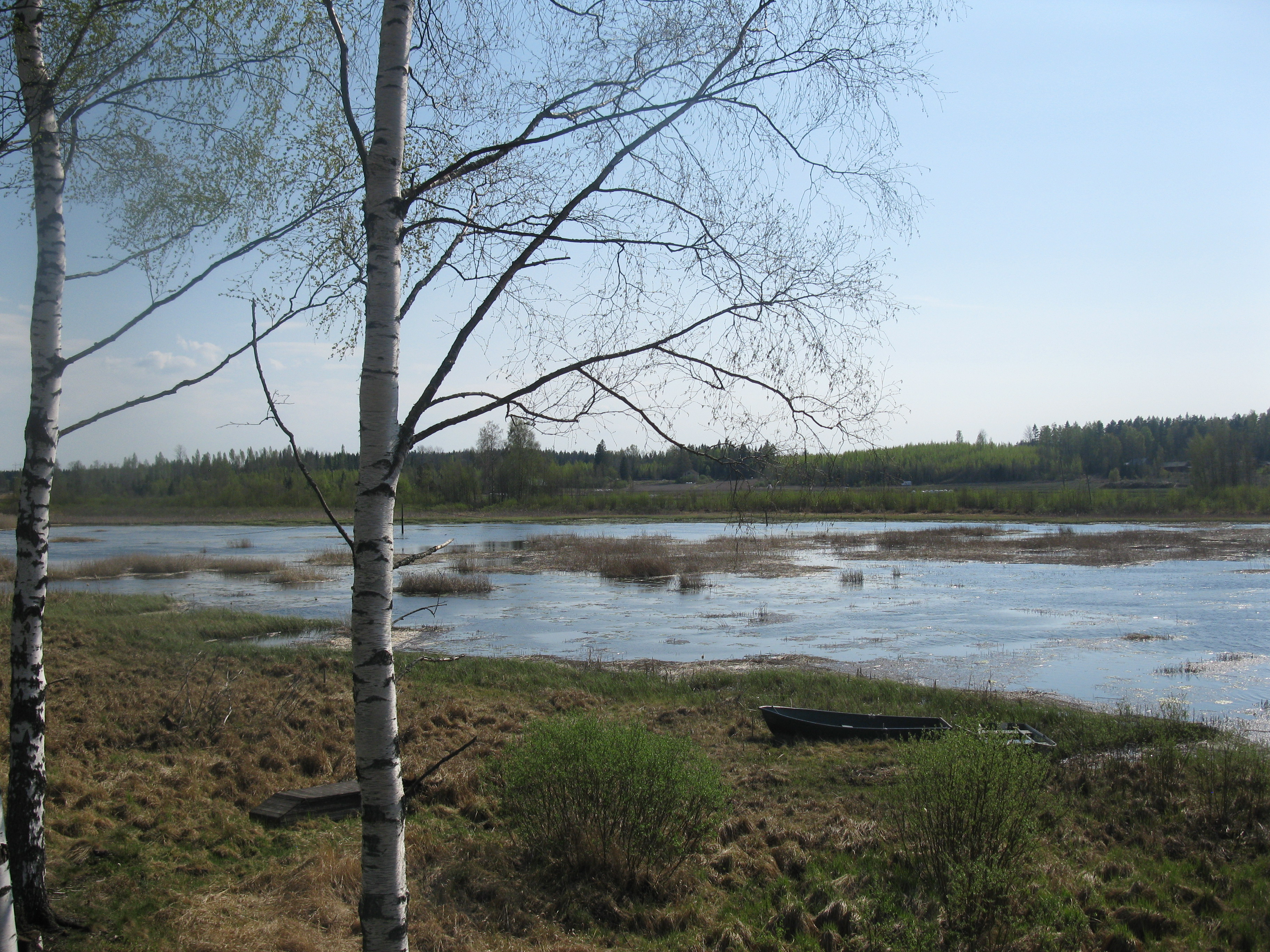 Kullaan Levajärven pohjoista allasta lintutornin luona.